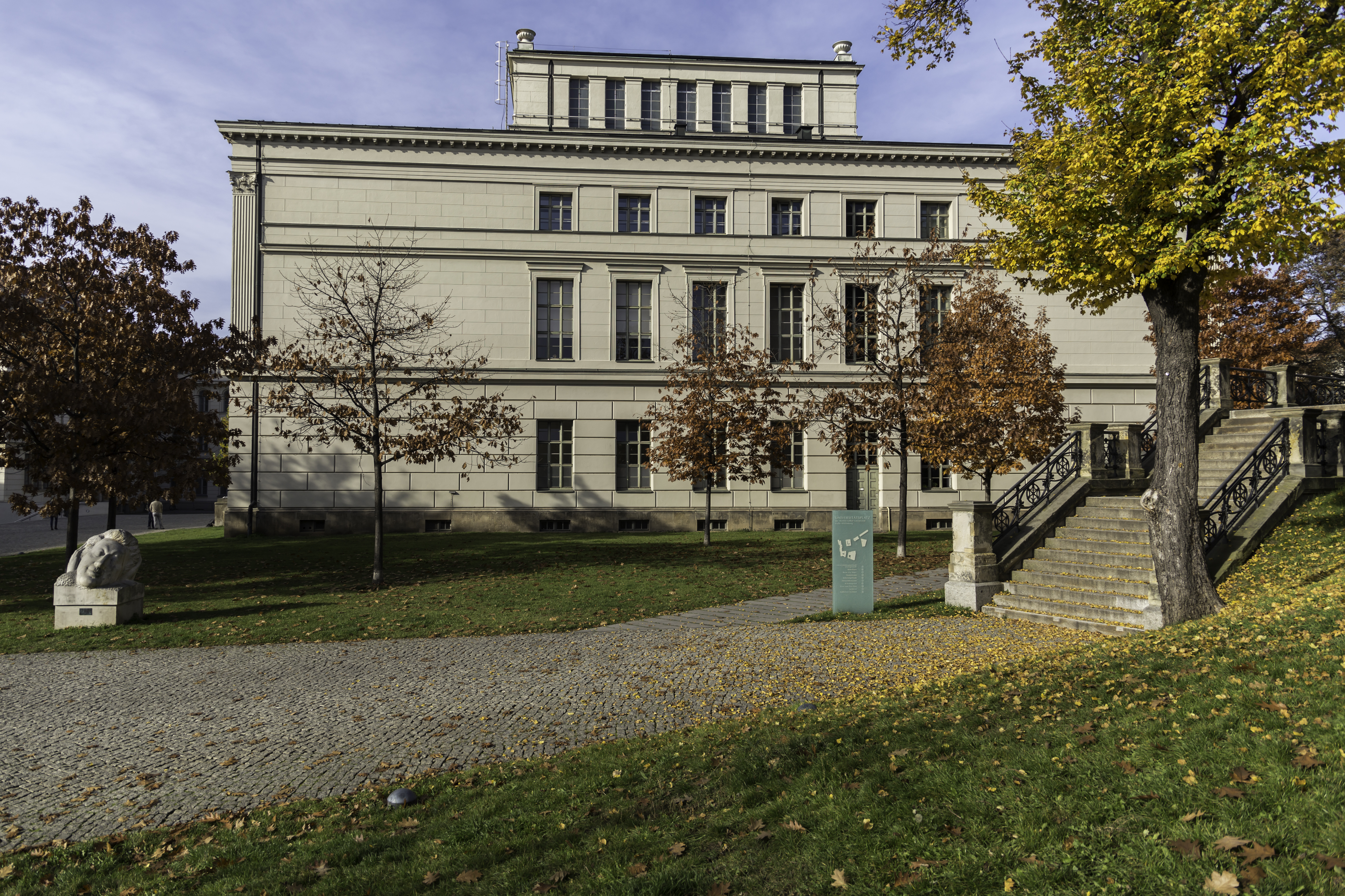 MLU Halle-Wittenberg - KUSTODIE Löwengebäude Altstadt Halle Saale